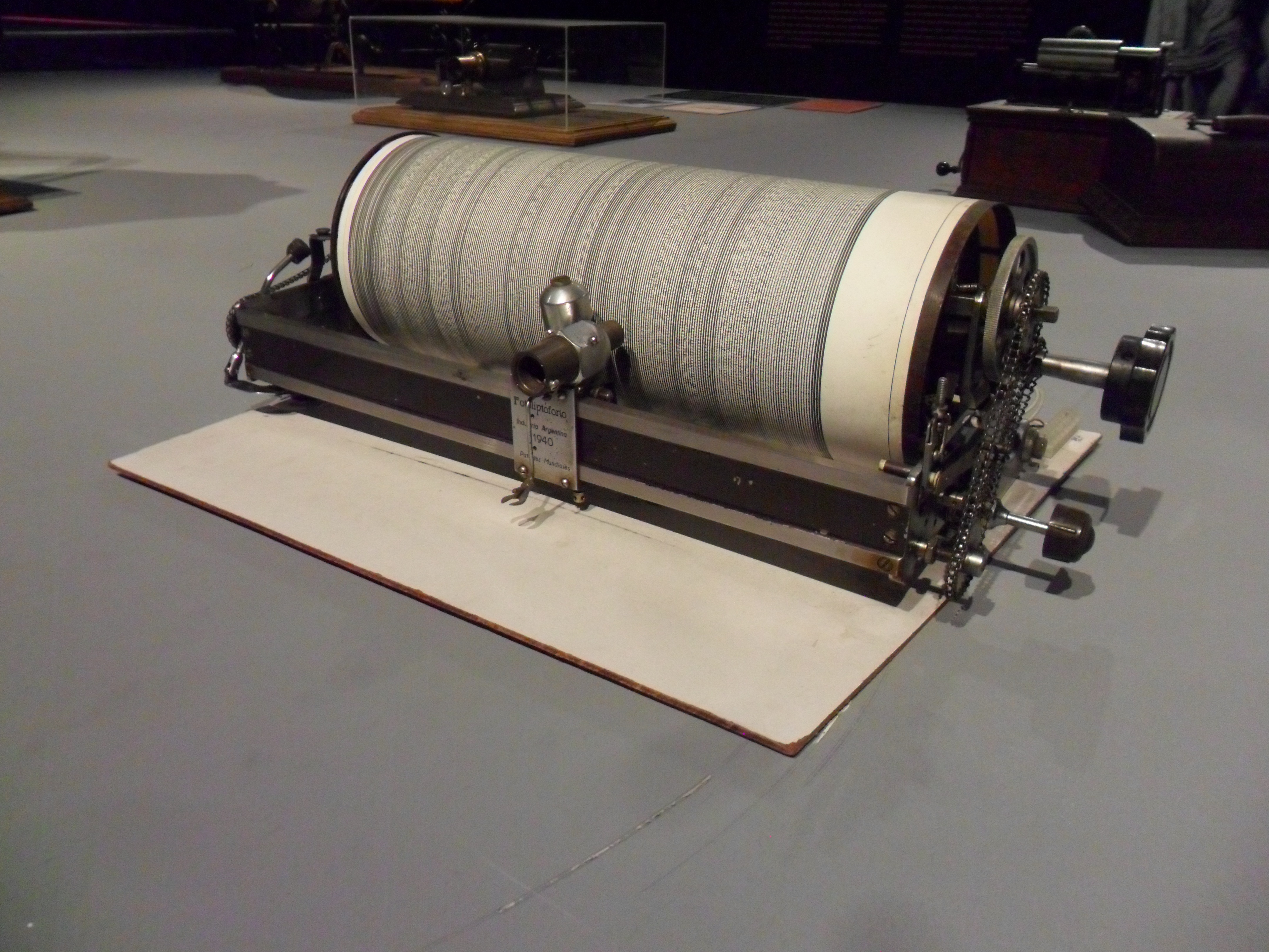 Fotoliptofono en la muestra Atrapando el Sonido de la Fundación Telefónica.